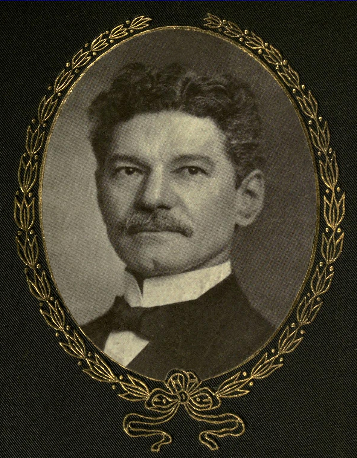 Louis Klopsch (1852–1910)